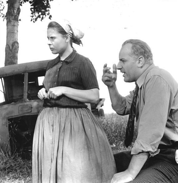 Zentralbild-DEFA frie-zie 20.9.1968 Berlin: "Wege übers Land" - Szenefoto Gertrud Habersaat (Ursula Karusseit) und der Kommunist Willy Hoyer (Manfred Krug) spielen Hauptrollen in Helmut Sakowskis dramatischem Fernsehroman, der zur Zeit in fünf Teilen über den Bildschirm geht. Regie in diesem speziell für das Fernsehen geschriebene Werk führte Martin Eckermann."